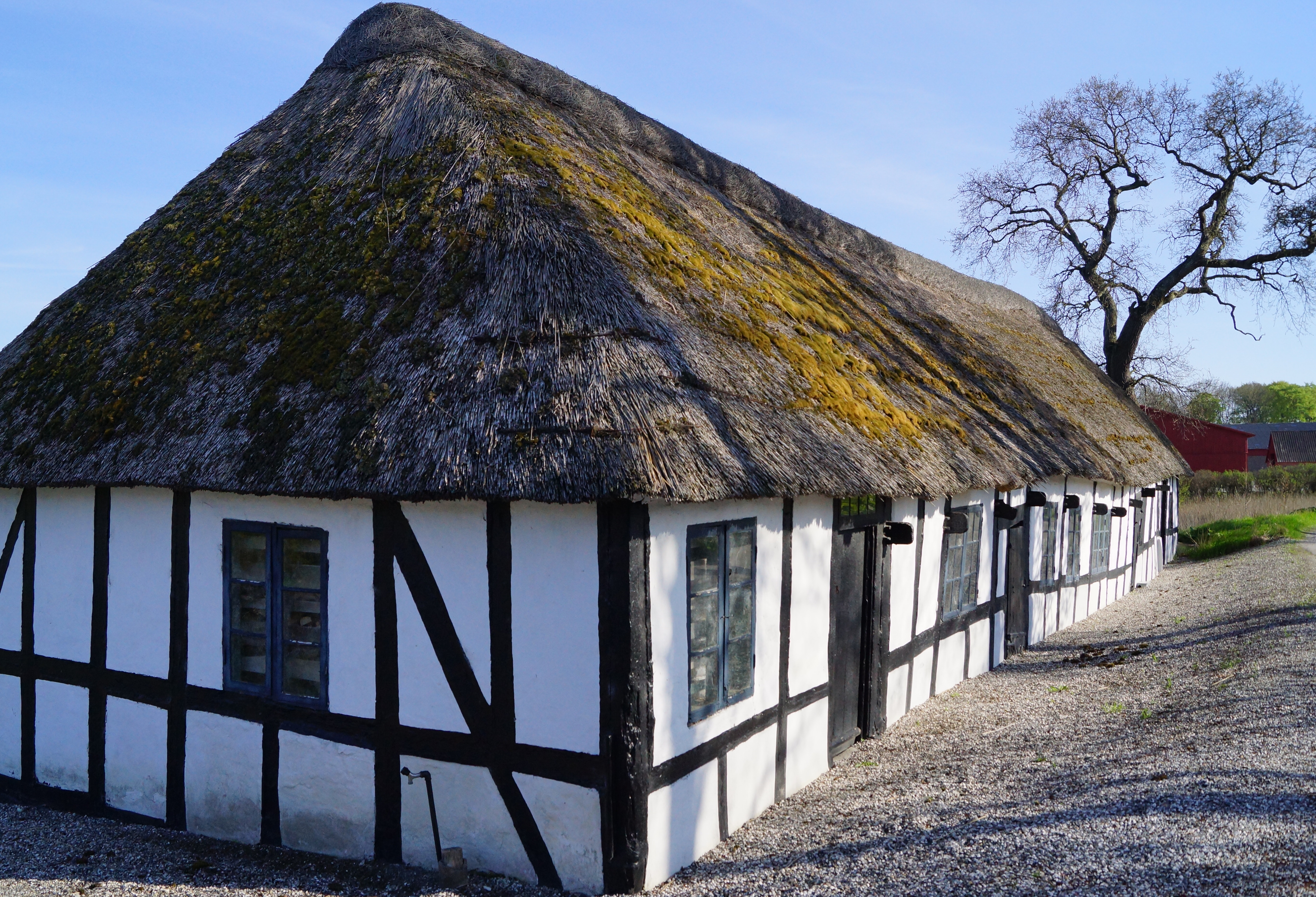 Katholm slot, Møllehus